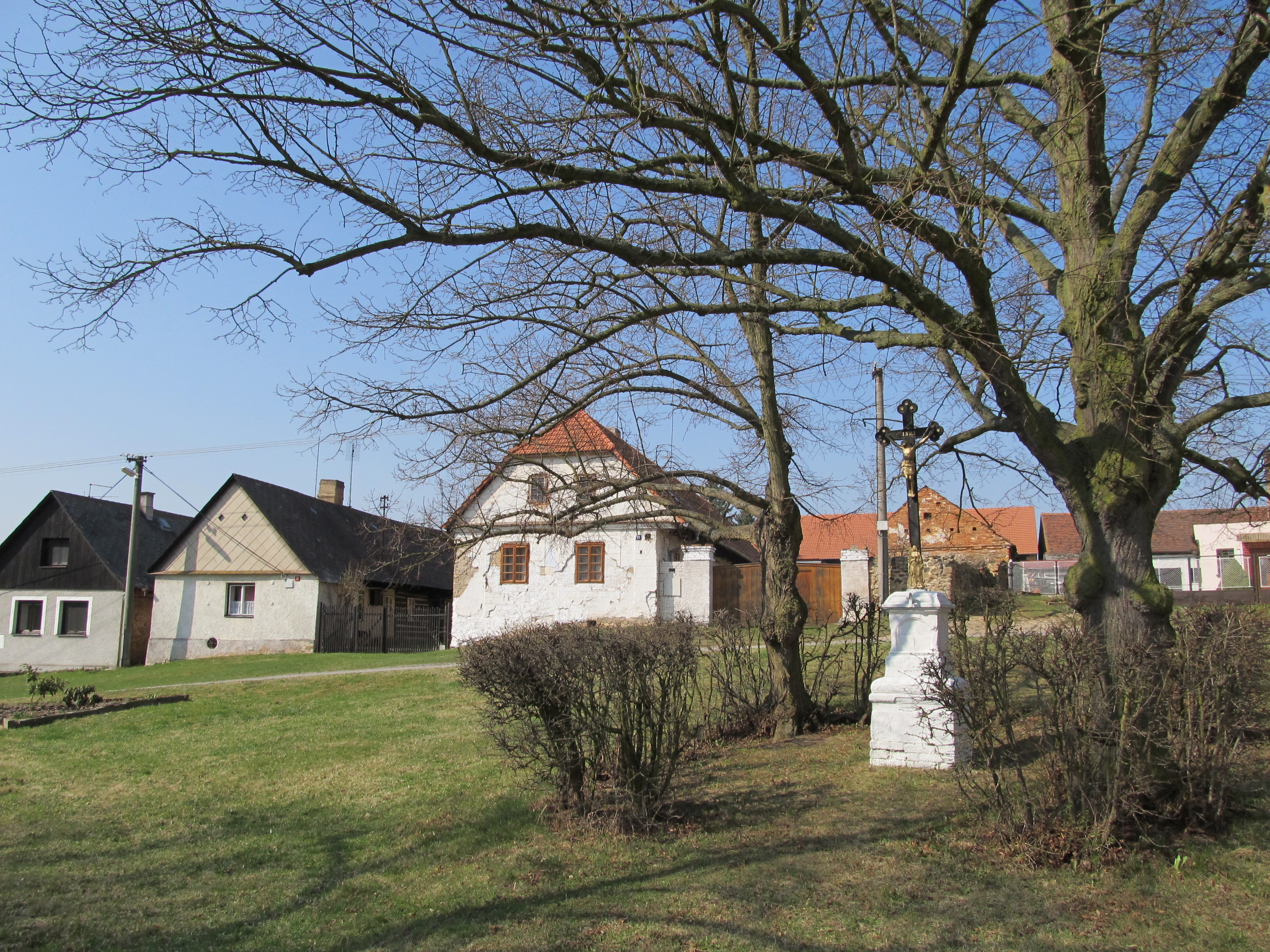 Hlohovičky - náves